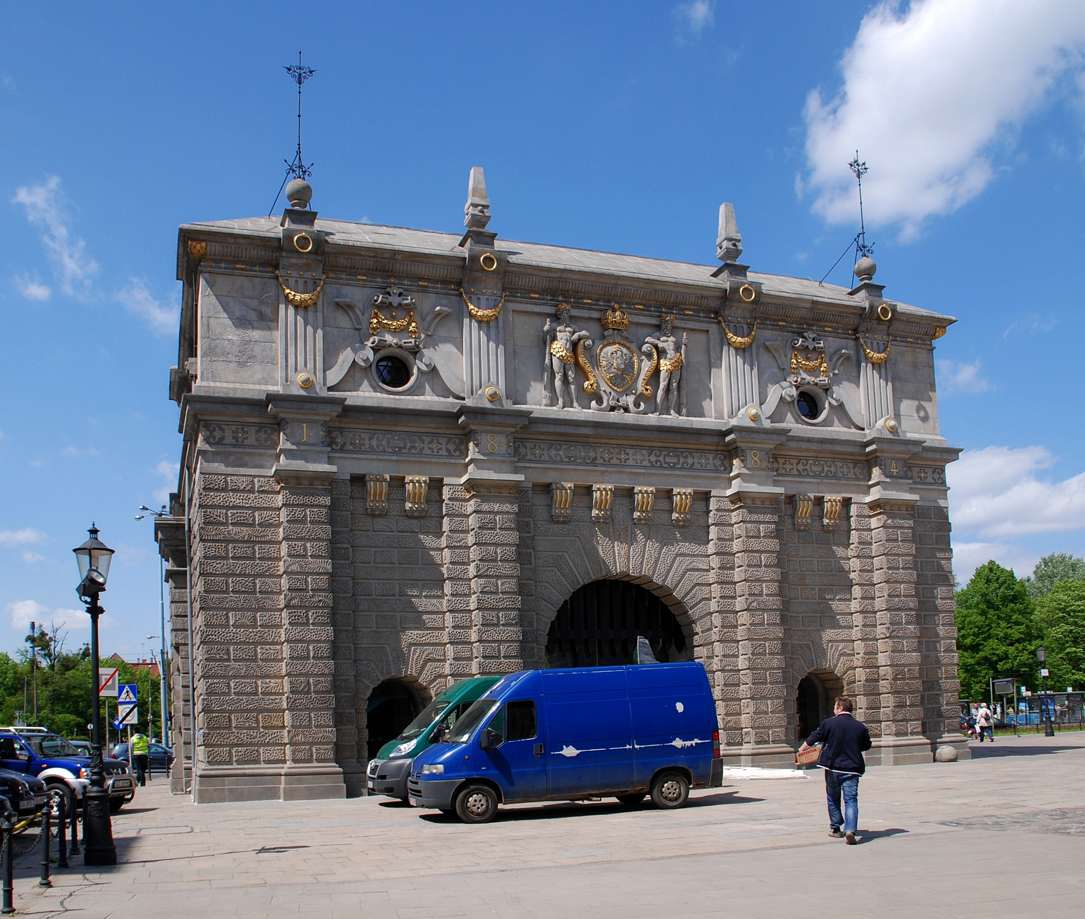 miasto Gdańsk